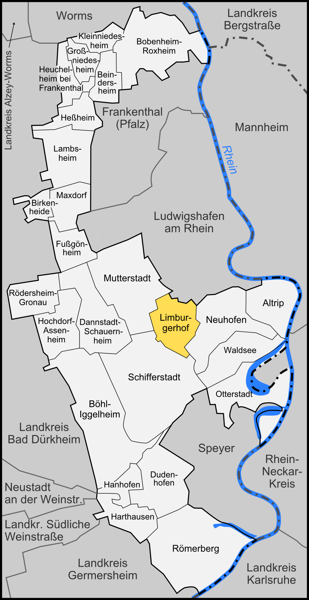 Karte der Gemeinde Limburgerhof im Rhein-Pfalz-Kreis